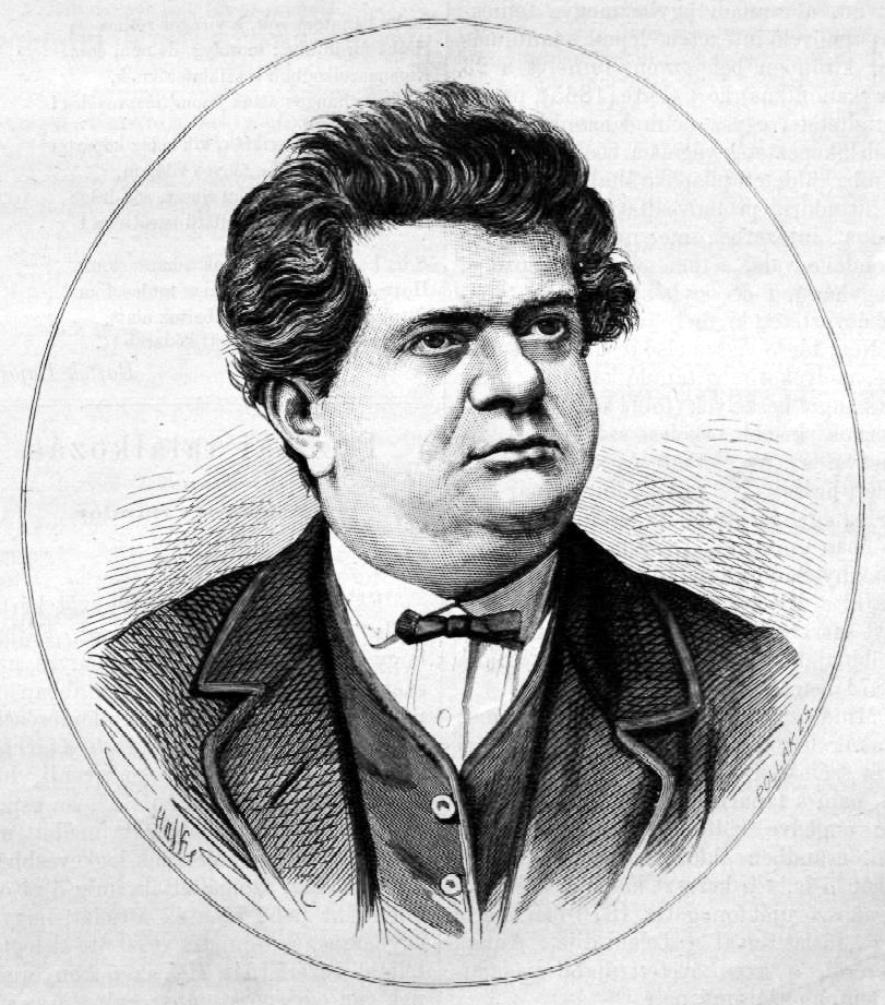 Csiky Gergely (1842–1891) portréja. Pollák Zsigmond metszete